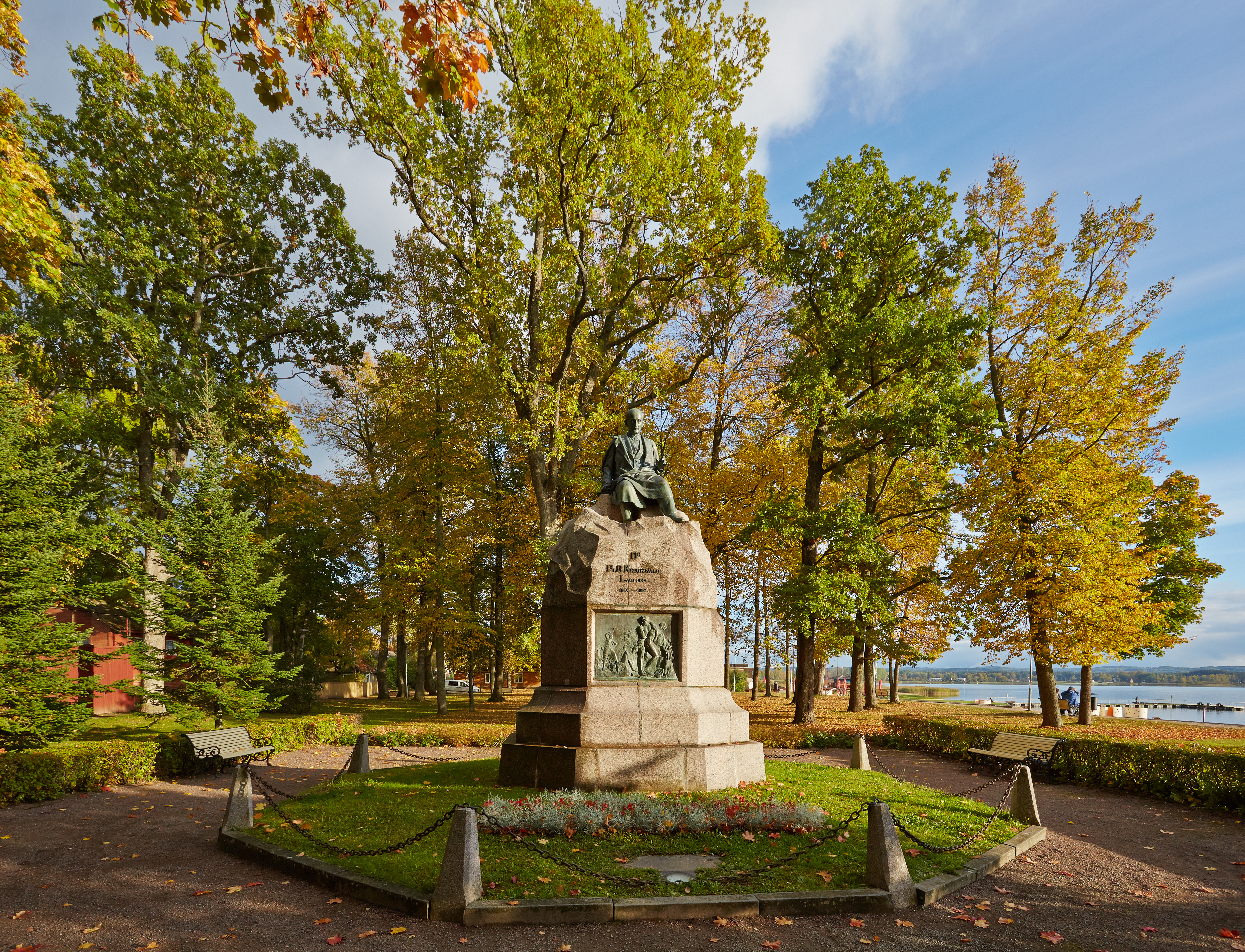 Fr.R.Kreutzwaldi monument Võrus 2013. aasta septembris.